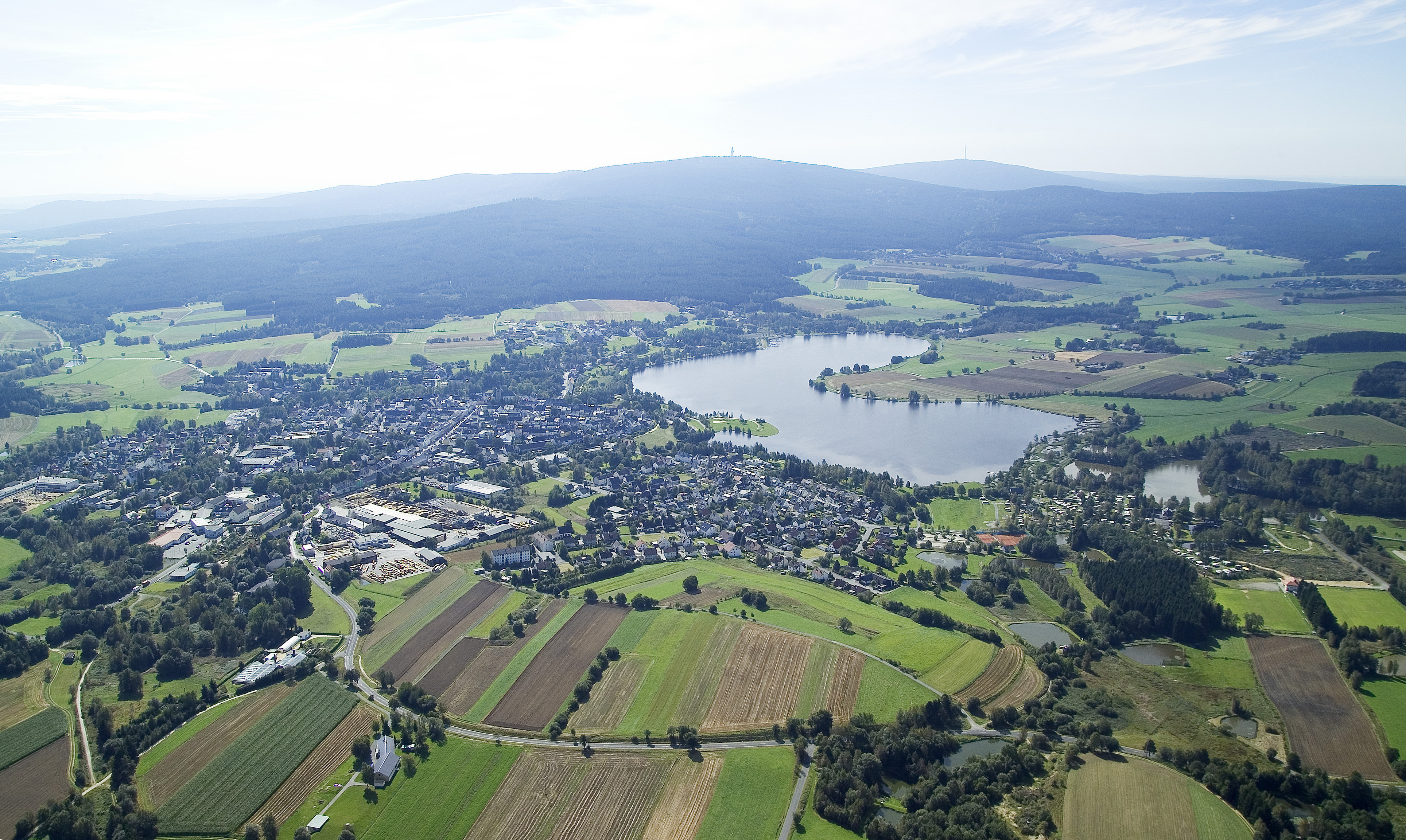 Weißenstadt aus der Luft im September 2005. Im Vordergrund die GELO Holzwerke. Im Hintergrund ist der Schneeberg und Ochsenkopf zu sehen.